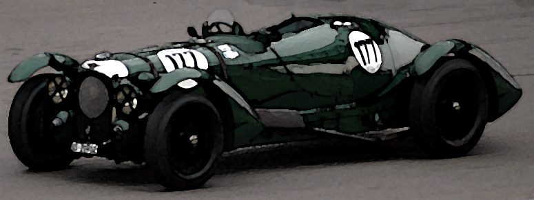 Lagonda-V 12, 1939, Le Mans-Version